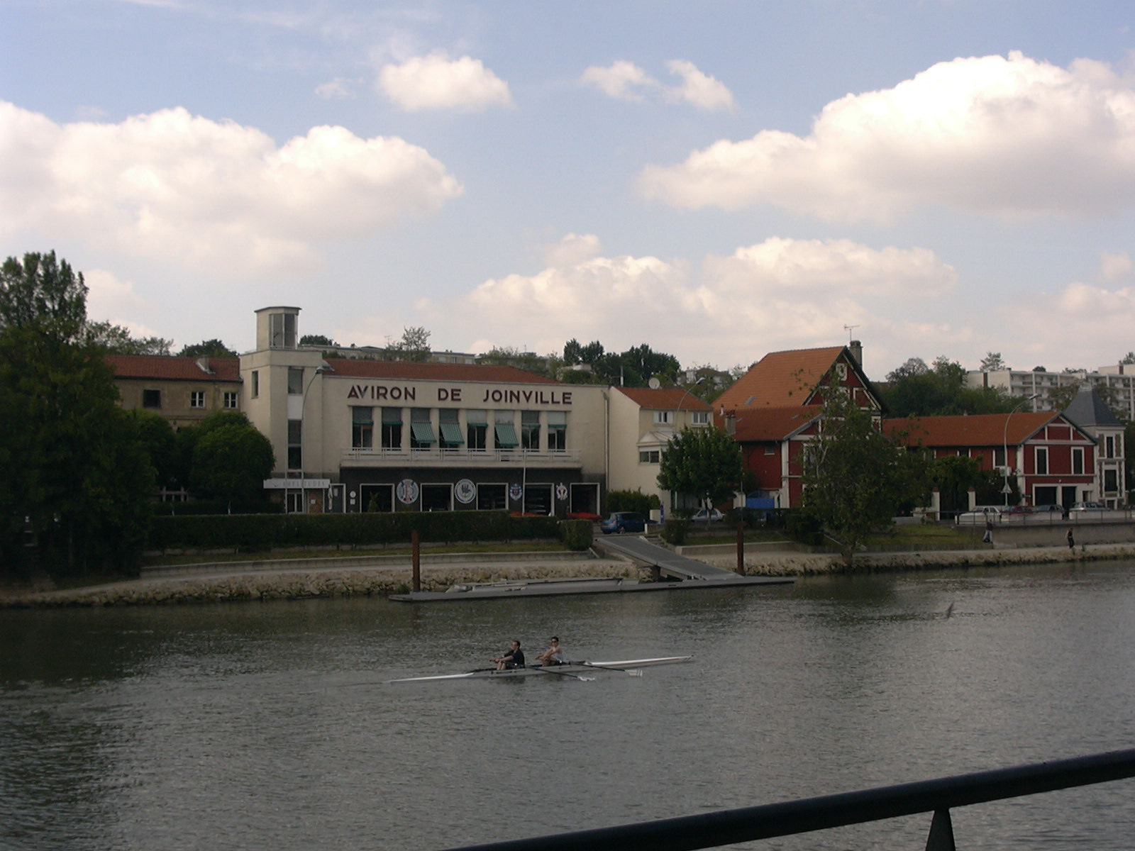 Vue de la Marne à Joinville le Pont (France) Bâtiment de l'Aviron Marne et Joinville Quai de la Marne 2004